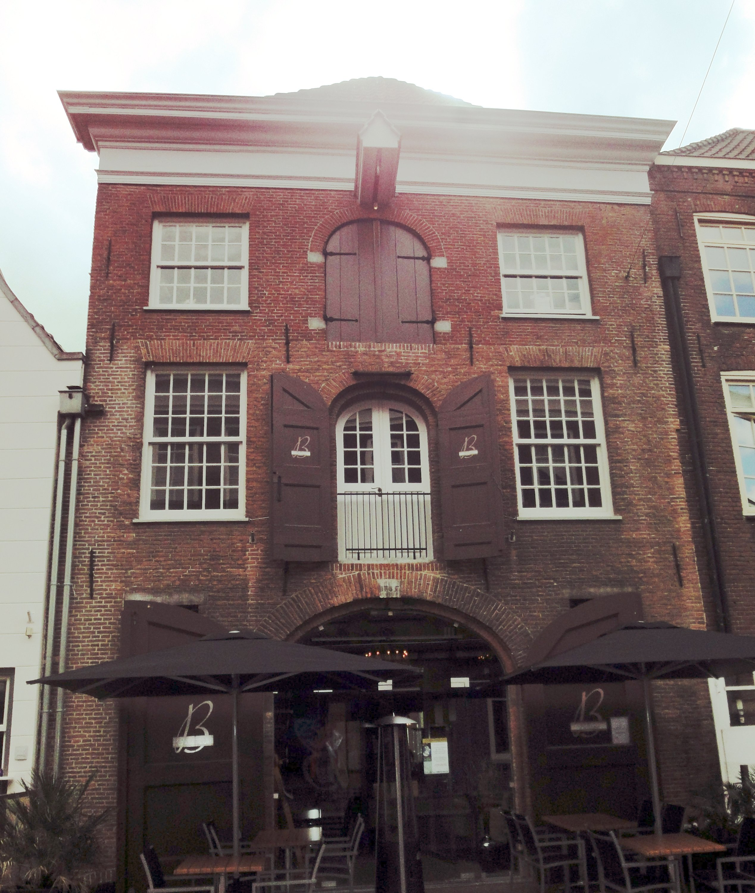 Karrenstraat 38, Den Bosch. Foto genomen tijden Wiki Takes Den Bosch. Dit is de voorgevel, de achtergevel is rijksmonument nr. 21695 en bevind zich aan de Kuissstraat 37 13″ N, 5° 18′ 03.32″ E